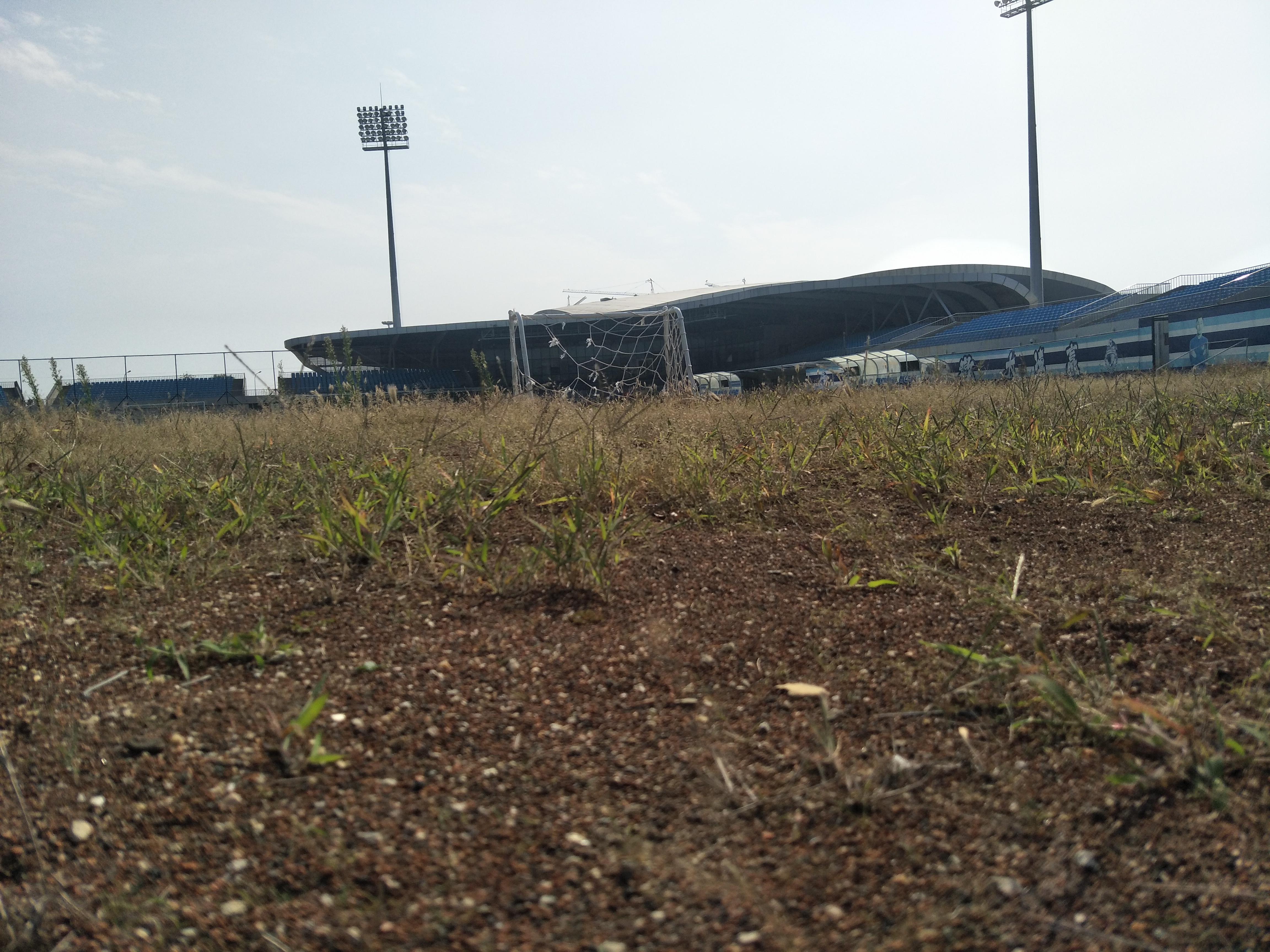 中文（中国大陆）: 大连体育中心棒球场